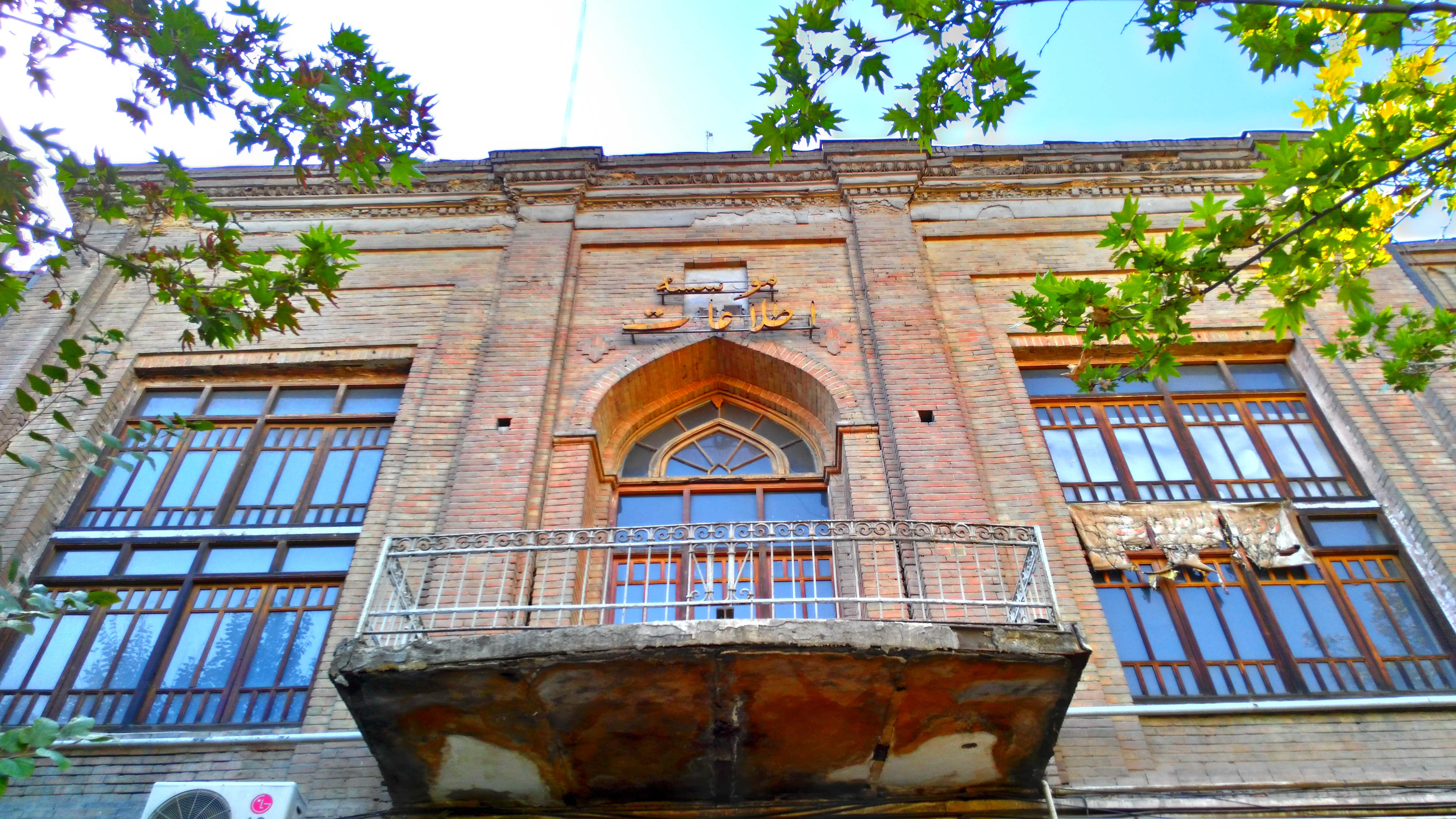 ساختمان روزنامه اطلاعات